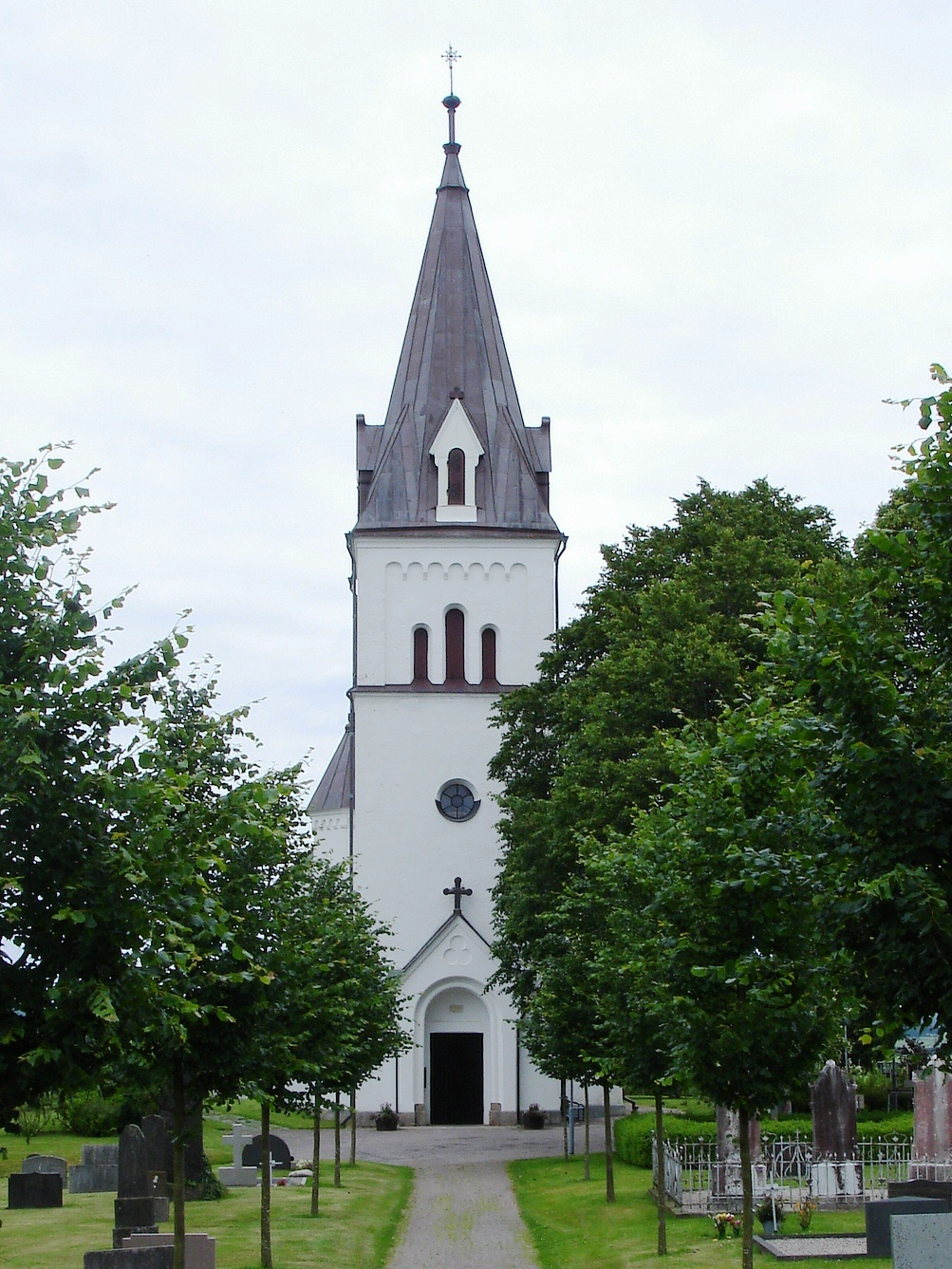 Eldsberga kyrka i södra Halmstads kommun i Hallands län